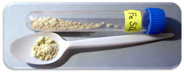 Síran železnatý - FeSO4